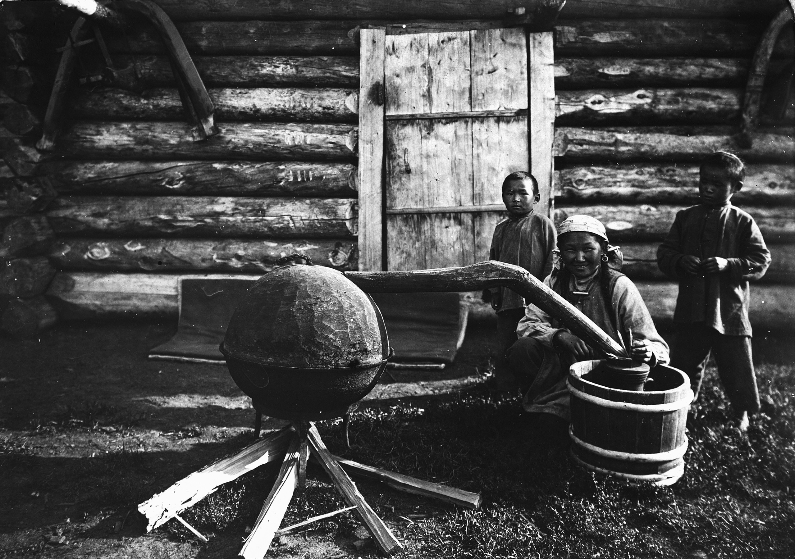 Варка тарасуна.